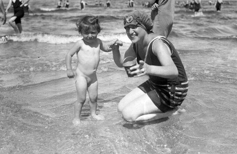 Grosstädter-Ferien an der See! Mäus' chens erstes Bad in der Ostsee.